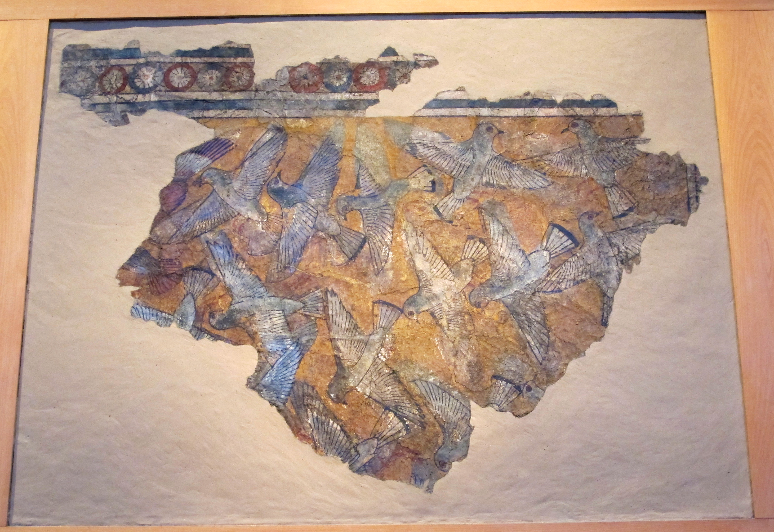 Collezione del Metropolitan Museum, NYC